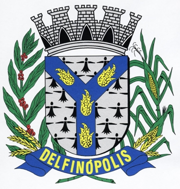 Brasão de Delfinópolis